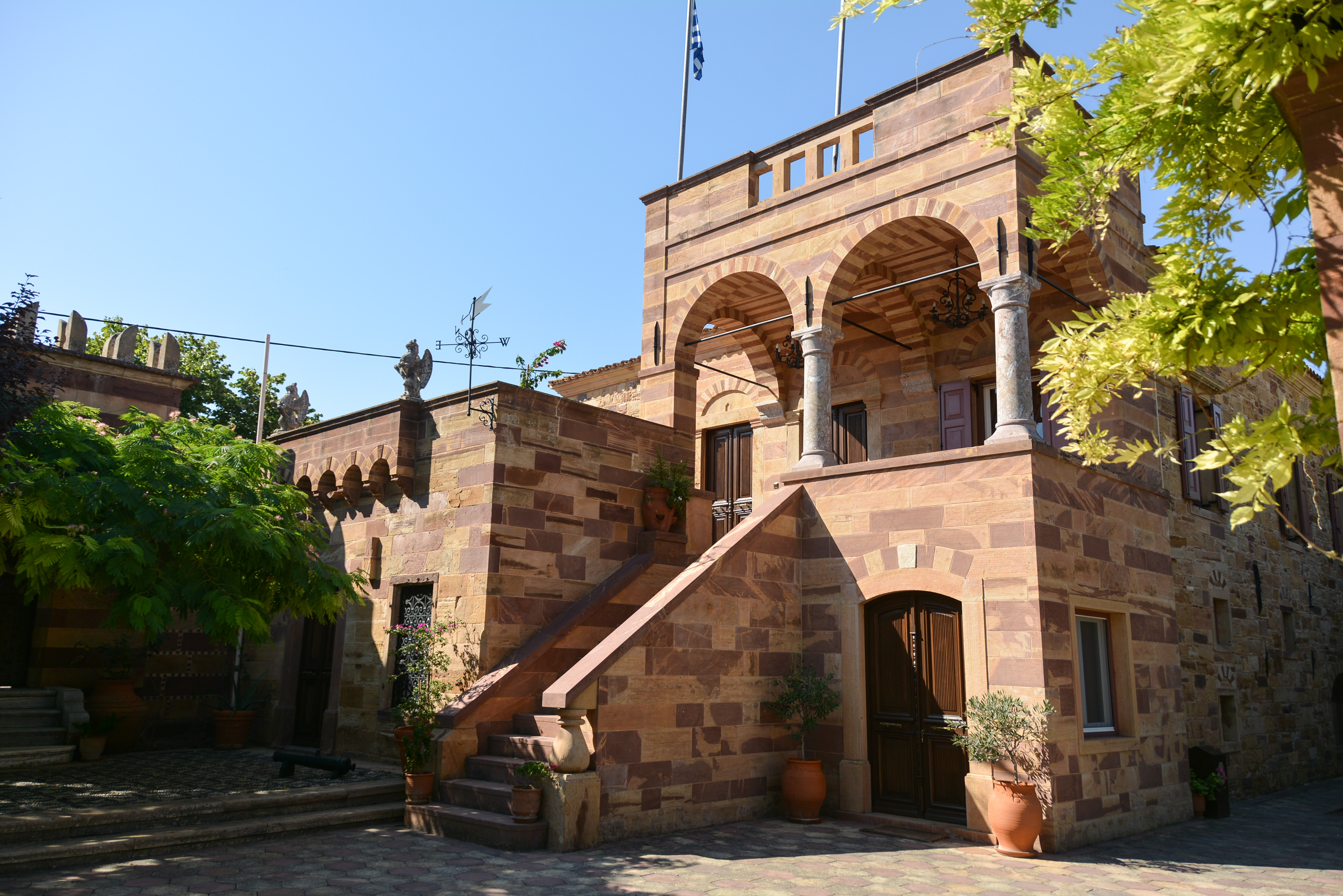 Κάμπος Χίου«Κάμπος Χίου»